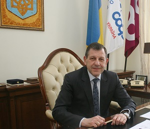 Гороховский Илья Леонидович